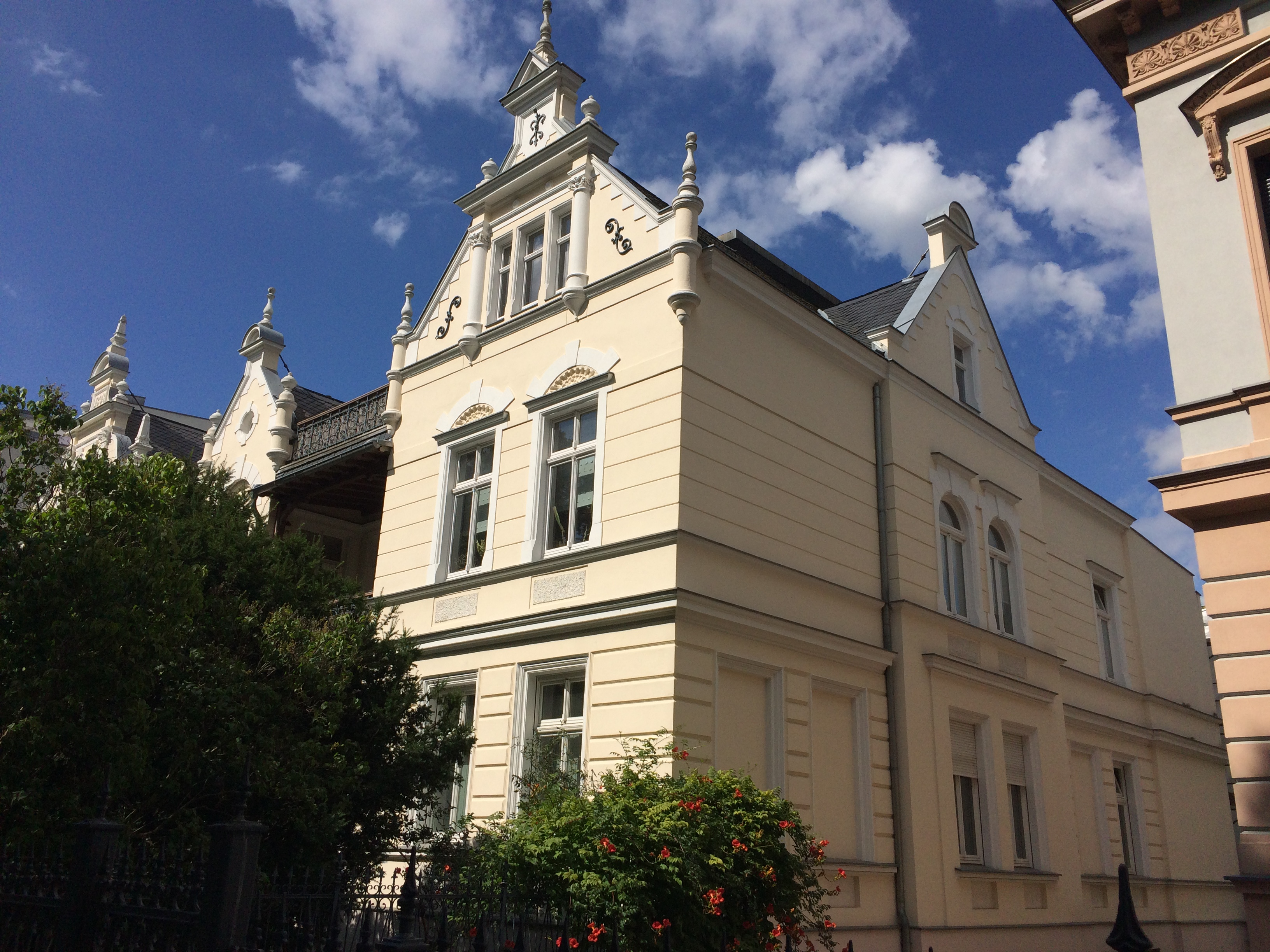 Das Foto zeigt das für sich selbst entworfene und gebaute Wohnhaus des Baunuternehmers und Stadtrats Ewald Schulz (1850-1906) an der heutigen Puschkinpromenade 3a in Cottbus.